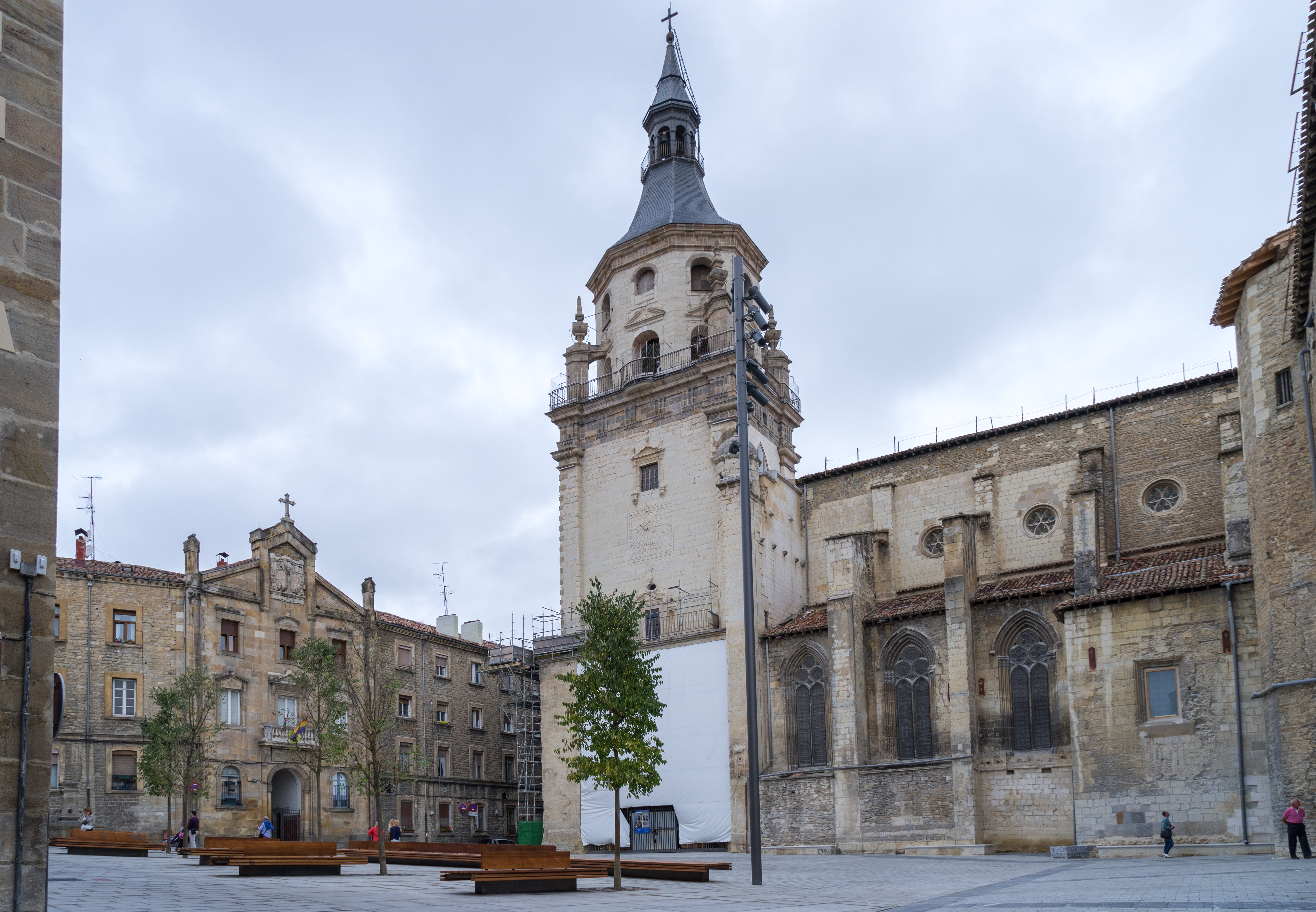 Vitoria-Gasteiz - Vieille Cathédrale